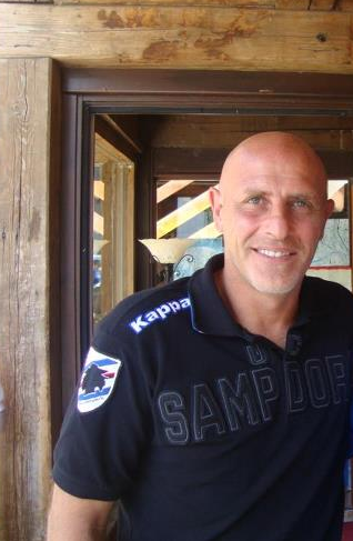 Antonio Chimenti attuale preparatore dei portieri della Sampdoria.